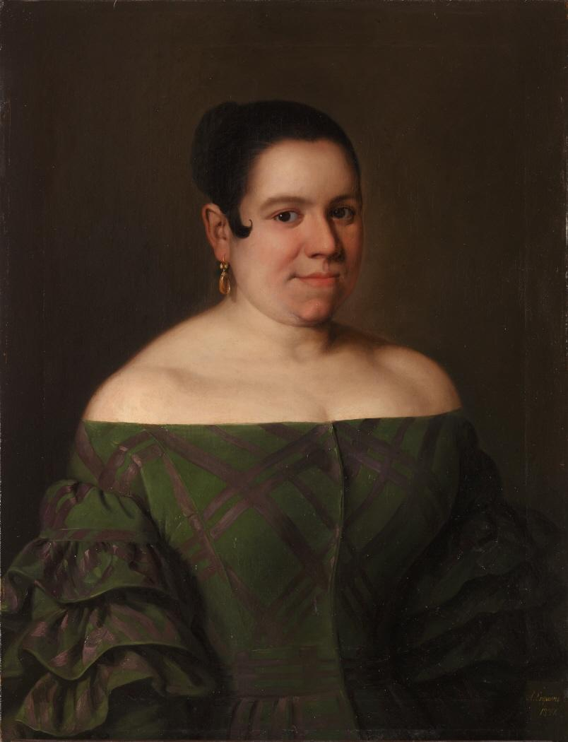 Retrato de la actriz teatral española Bárbara Lamadrid (1812-1893).